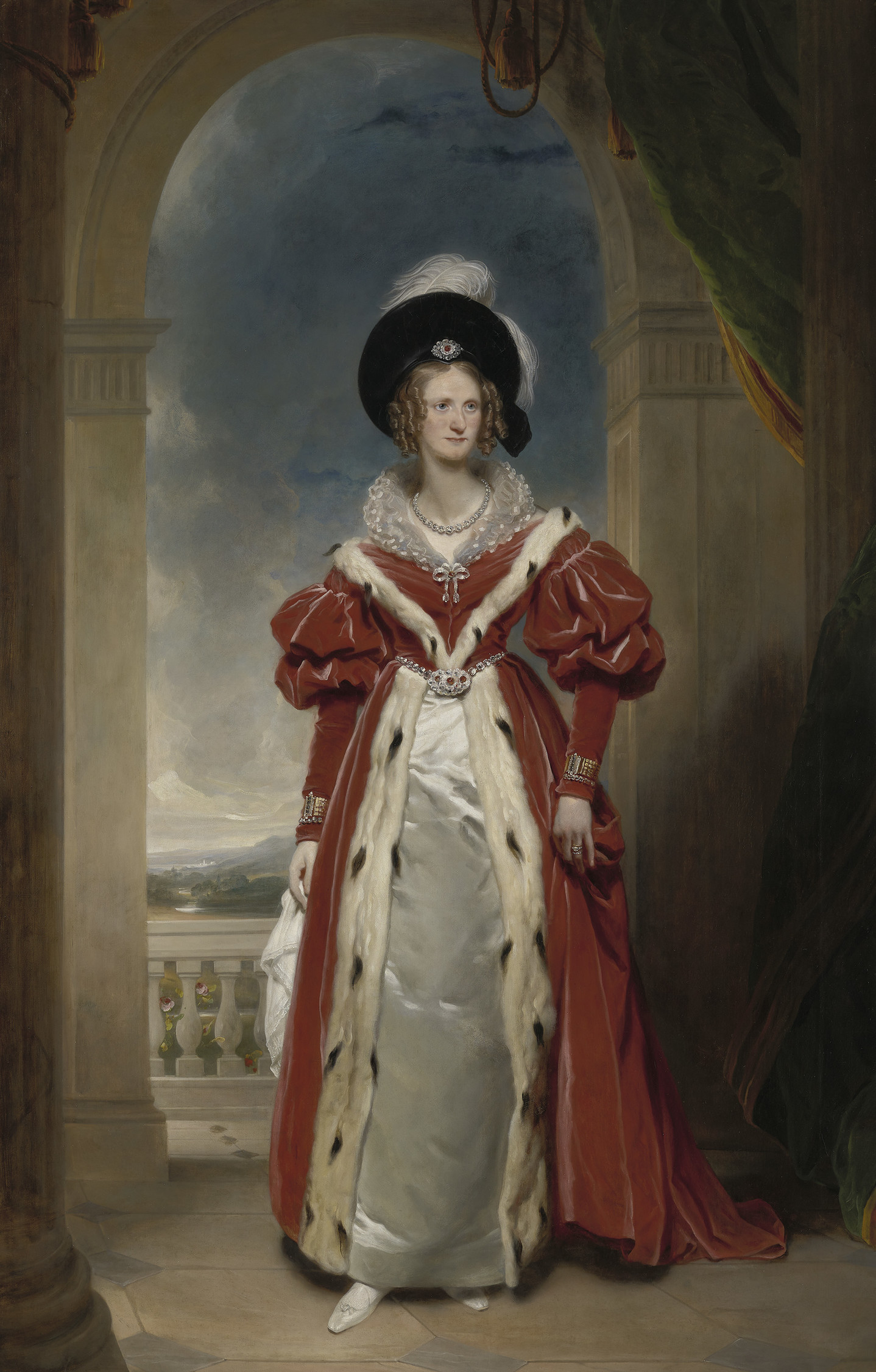 Аделаида Саксен-Мейнингенская, королева Великобритании Caption from the museum's website Shee received the King’s commands to be in attendance at Windsor from 14 May 1836, in order to begin a full-length portrait of the Queen to be placed in the hall of the Goldsmiths’ Company. By 18 May he had received a second sitting, but he felt the ‘high approbation’ that had been expressed, was almost ridiculous in view of the small progress that he had made. The artist commented that the Queen presented difficulties as a subject ‘beyond anything I could have anticipated’, as she ‘particularly requests that the picture may not be flattered’. When the portrait was completed, the King was so pleased with its composition and execution that he retained it for himself. The artist was therefore commissioned by the Queen to produce another portrait for the Goldsmiths. This was completed by 24 November 1837 and is still in their Hall. Shee was paid £766. 10s. for the two paintings. Since the 1840s this portrait has hung on the Grand Staircase at Buckingham Palace as part of a dynastic sequence, paired with Lawrence's 'William IV' (OM 877, 405427). The Queen is shown wearing a feathered hat with a rich velvet crimson pelise trimmed with ermine over a white satin skirt and holding a handkerchief in her right hand.